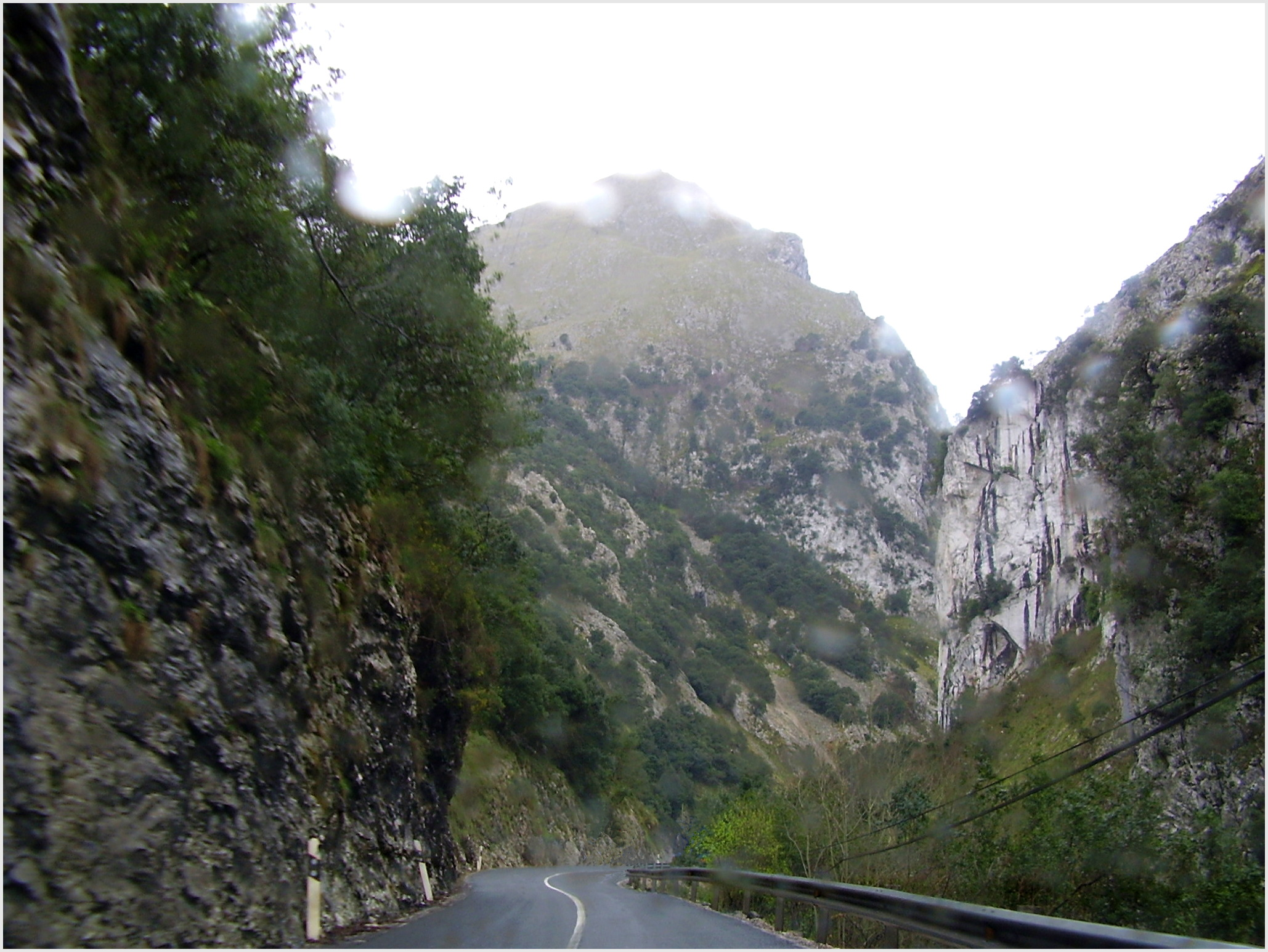 Desfiladero de La Hermida, en Cantabria (España)